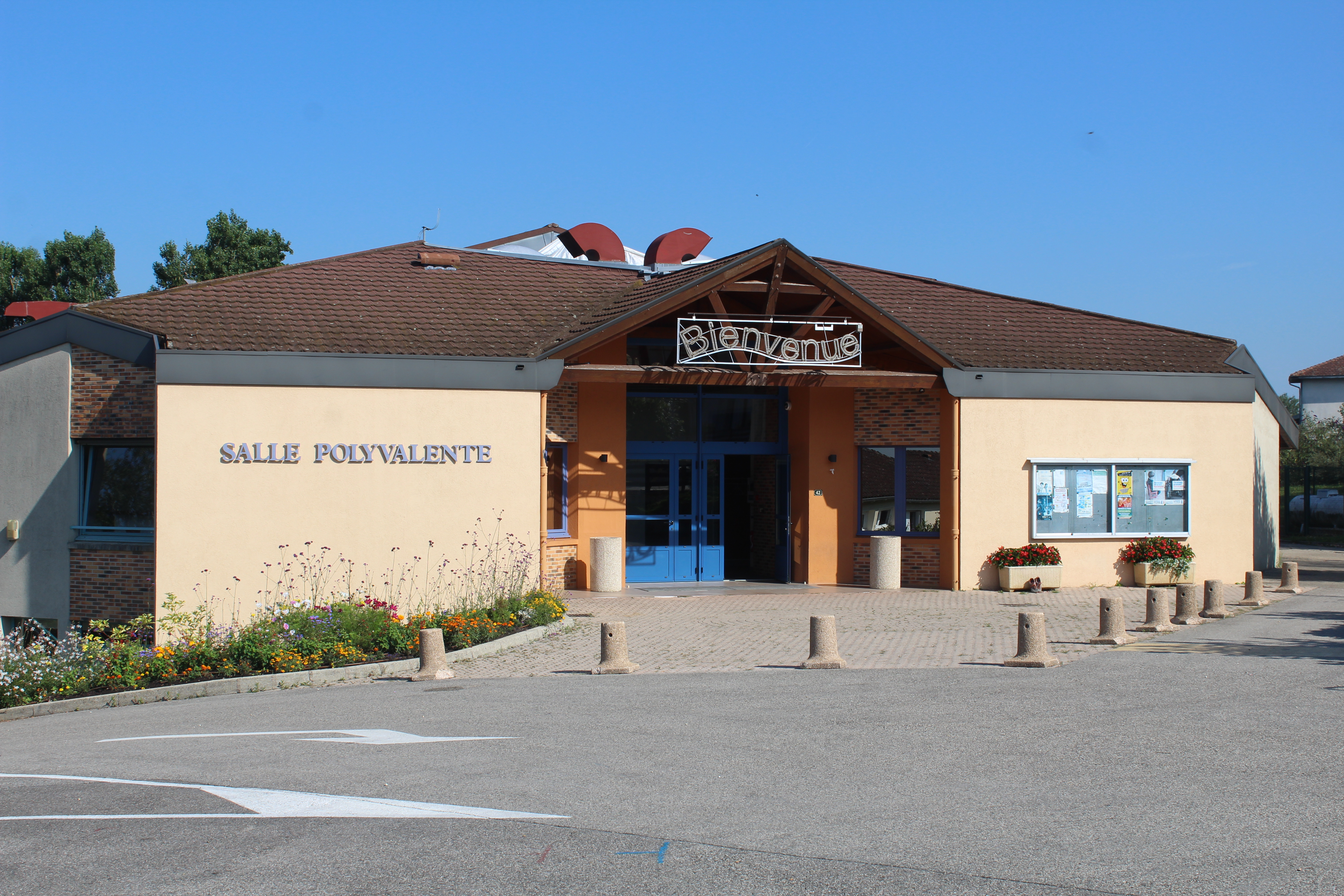 Salle polyvalente de Saint-Cyr-sur-Menthon.